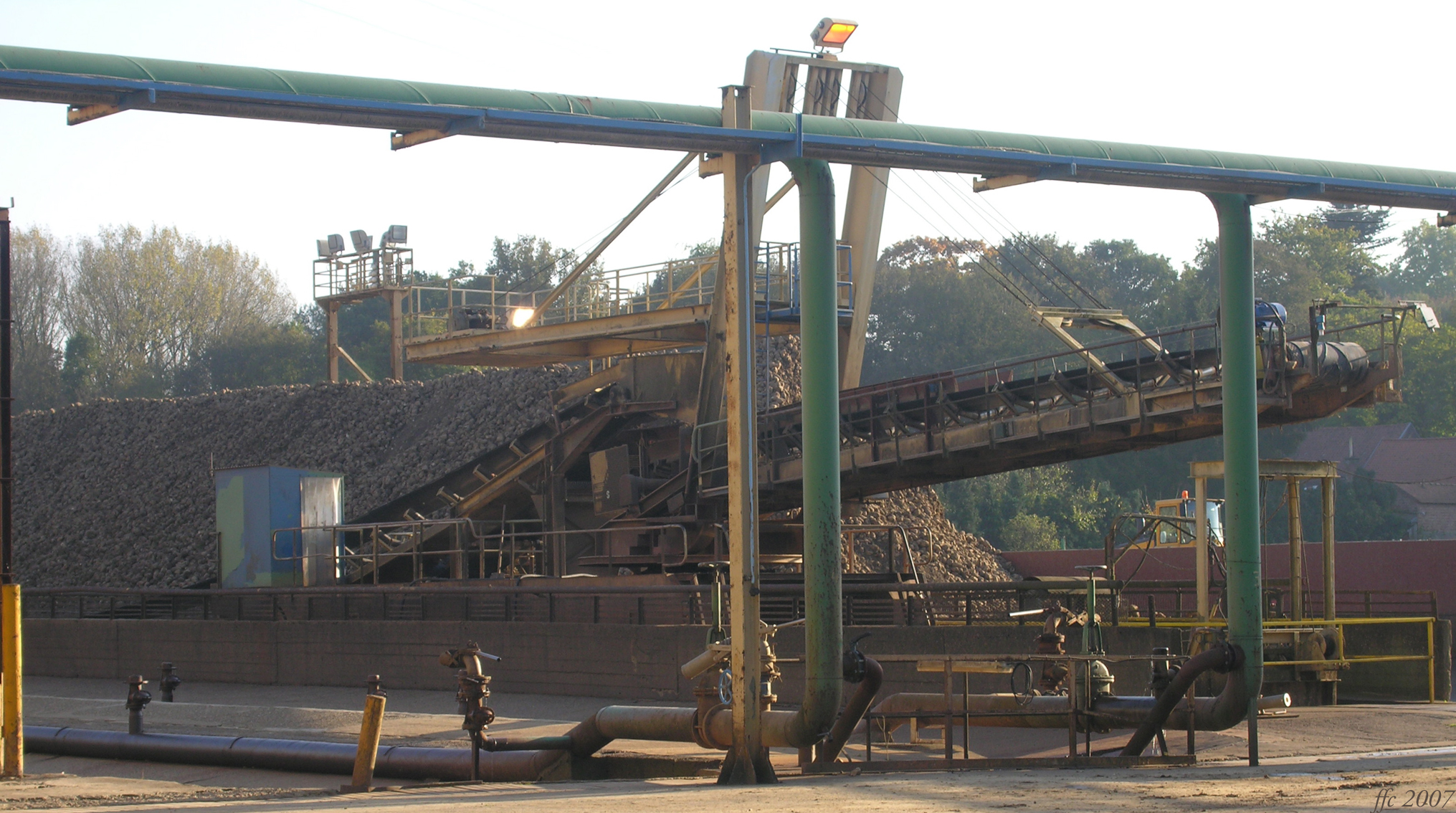 Hollogne-sur-Geer (Belgium) Sugar factory Betteraves à sucre dans la sucrerie Mont de remolatxes a la fàbrica de sucre Geoogste suikerbieten in de raffinaderij